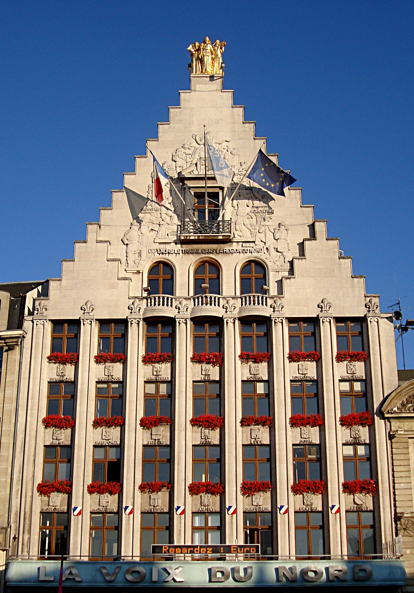 La façade de la Voix du Nord sur la Grand Place à Lille (Nord).